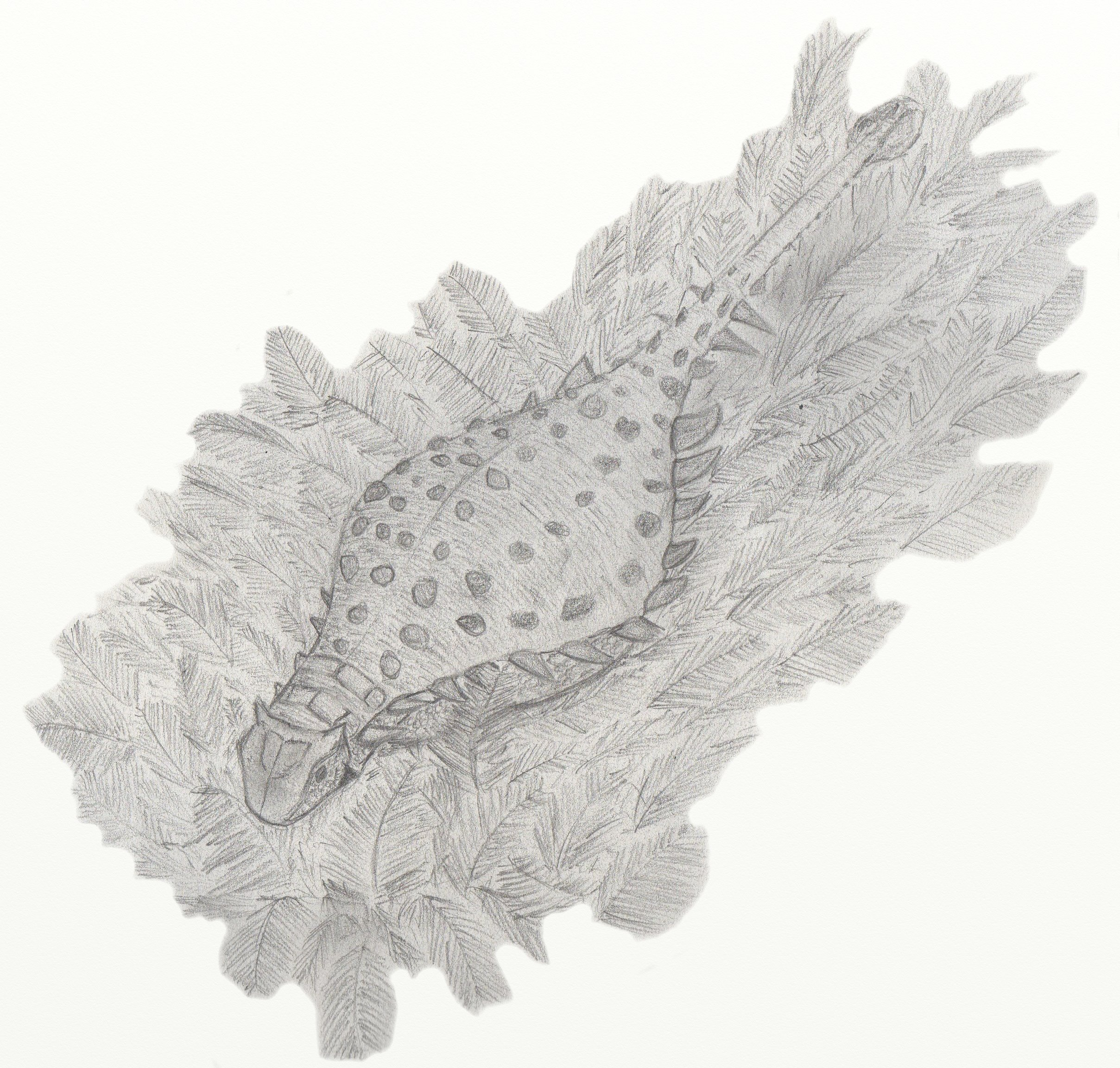 Reconstruction de Pinacosaurus